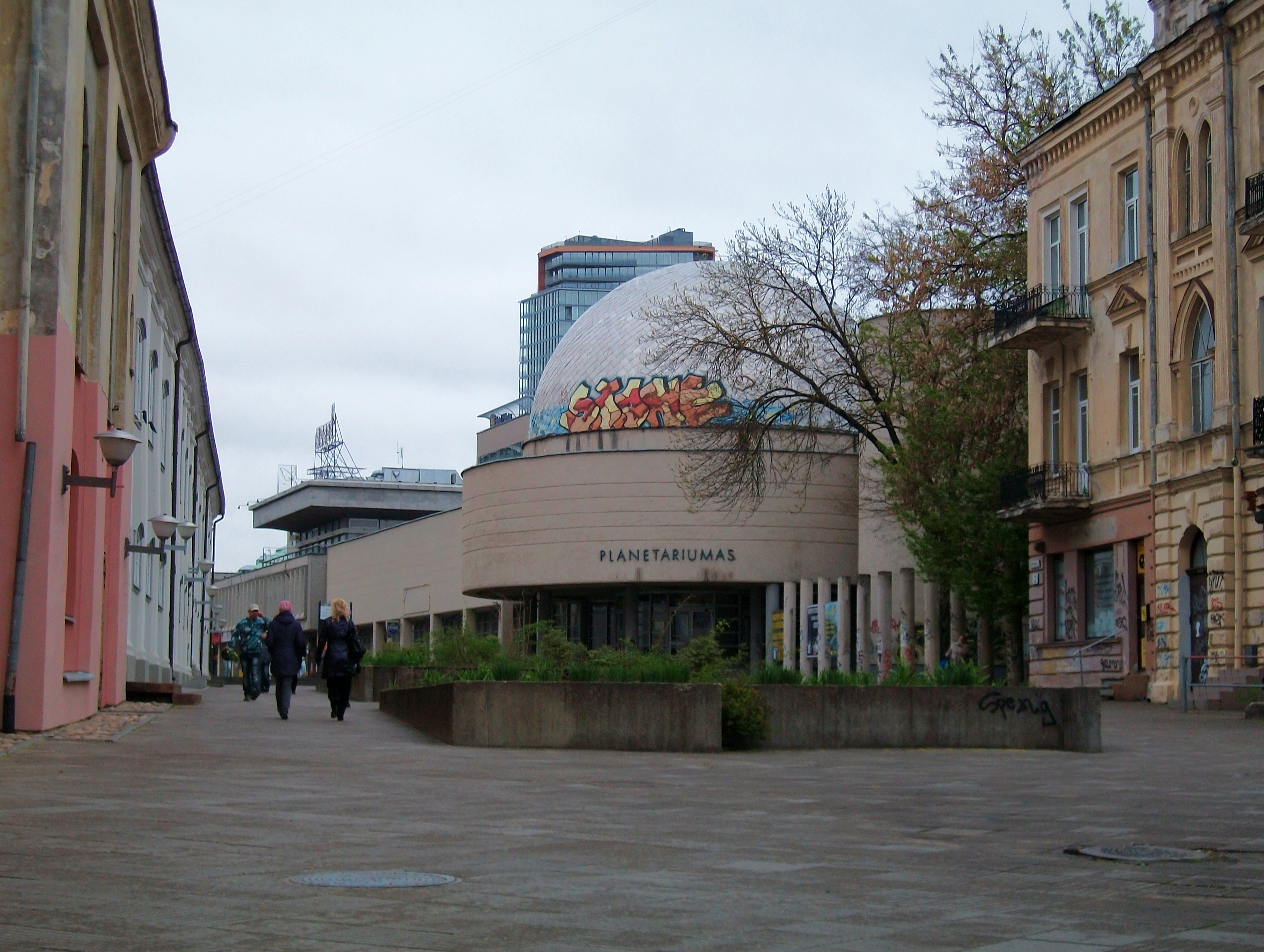 Vilnius - Planetarium (Litauen)